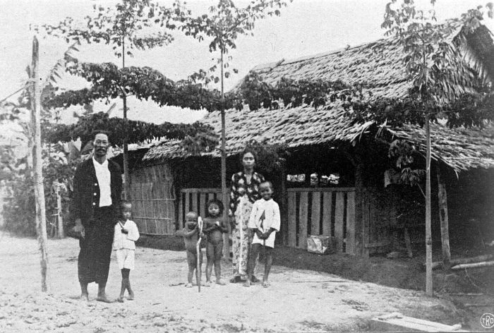 Repronegatief. Kolonistenwoning met het dorpshoofd (lurah) van Sidodadi, Sulawesi.